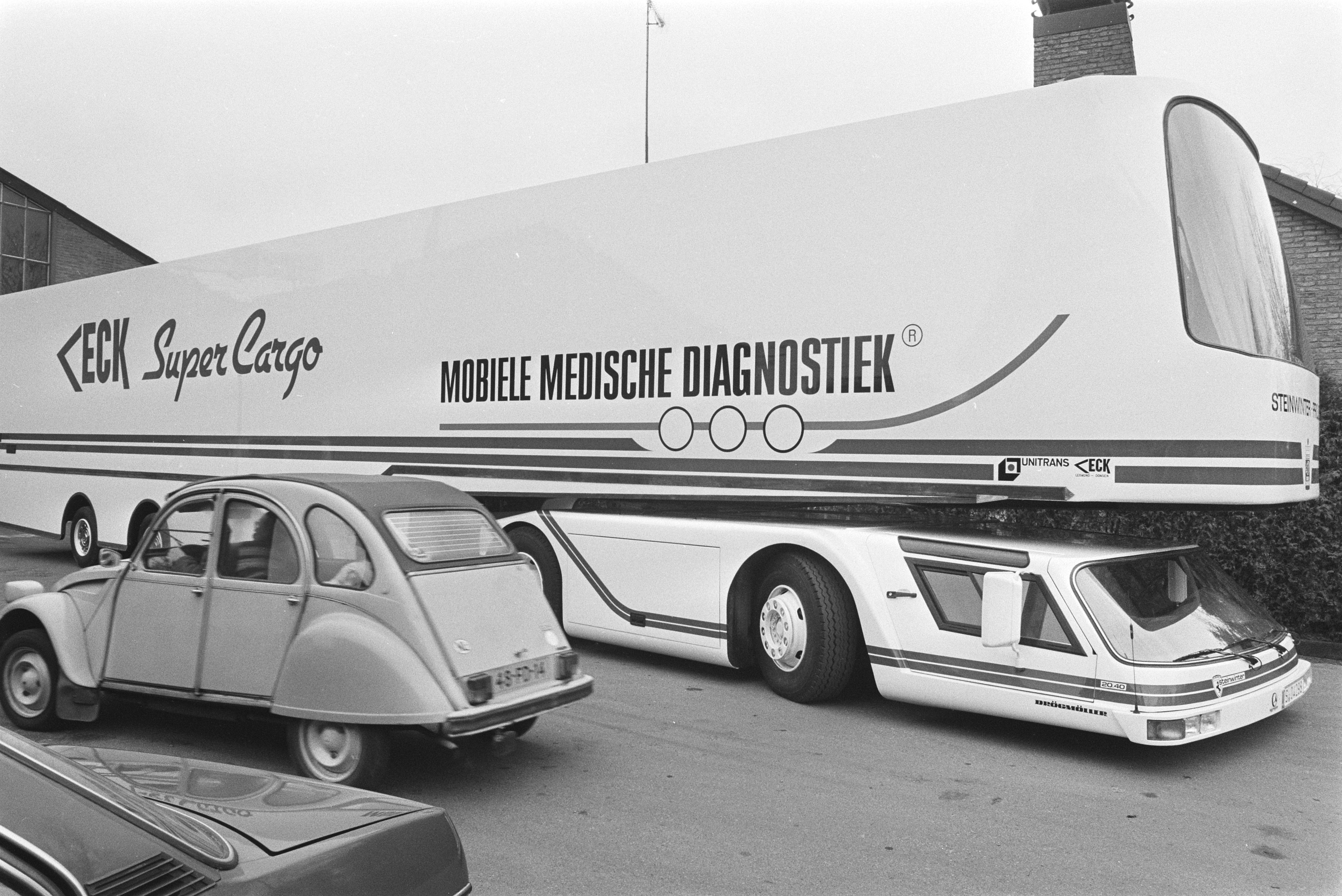 Collectie / Archief : Fotocollectie Anefo Reportage / Serie : [ onbekend ] Beschrijving : 18 meter lang mobiel ziekenhuis (carrosserie bouwer ECK uit Lexmond) Datum : 1 februari 1984 Locatie : Lexmond Trefwoorden : mobielen, ziekenhuizen Persoonsnaam : ECK Fotograaf : Croes, Rob C. / Anefo Auteursrechthebbende : Nationaal Archief Materiaalsoort : Negatief (zwart/wit) Nummer archiefinventaris : bekijk toegang 2.24.01.05 Bestanddeelnummer : 932-8515